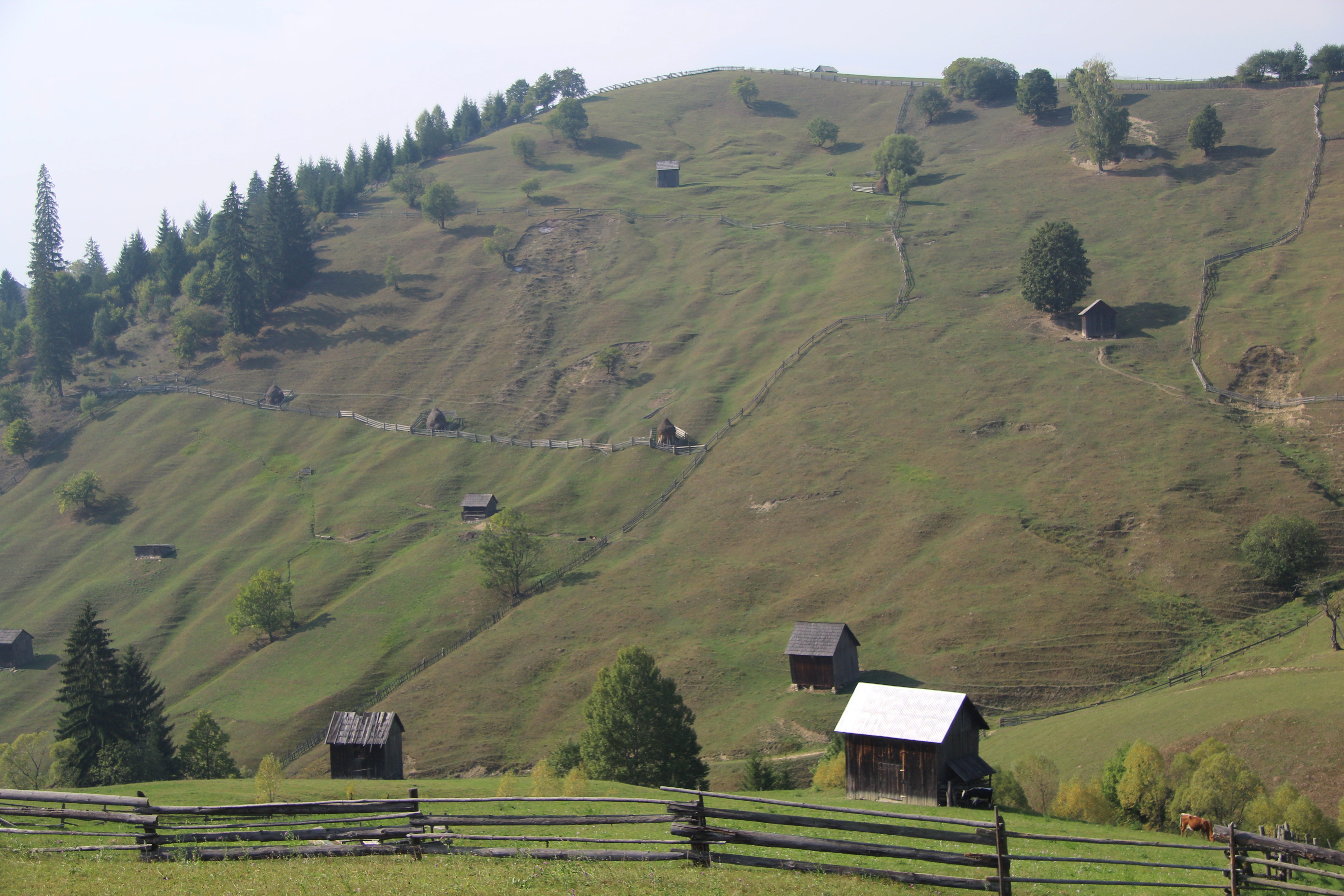 Weidelandschaft bei Moldovita, Kreis Suceava, Rumänien